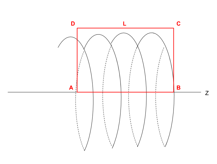 Calcul du champs magnétique d'un soléinoide infini par un rectangle